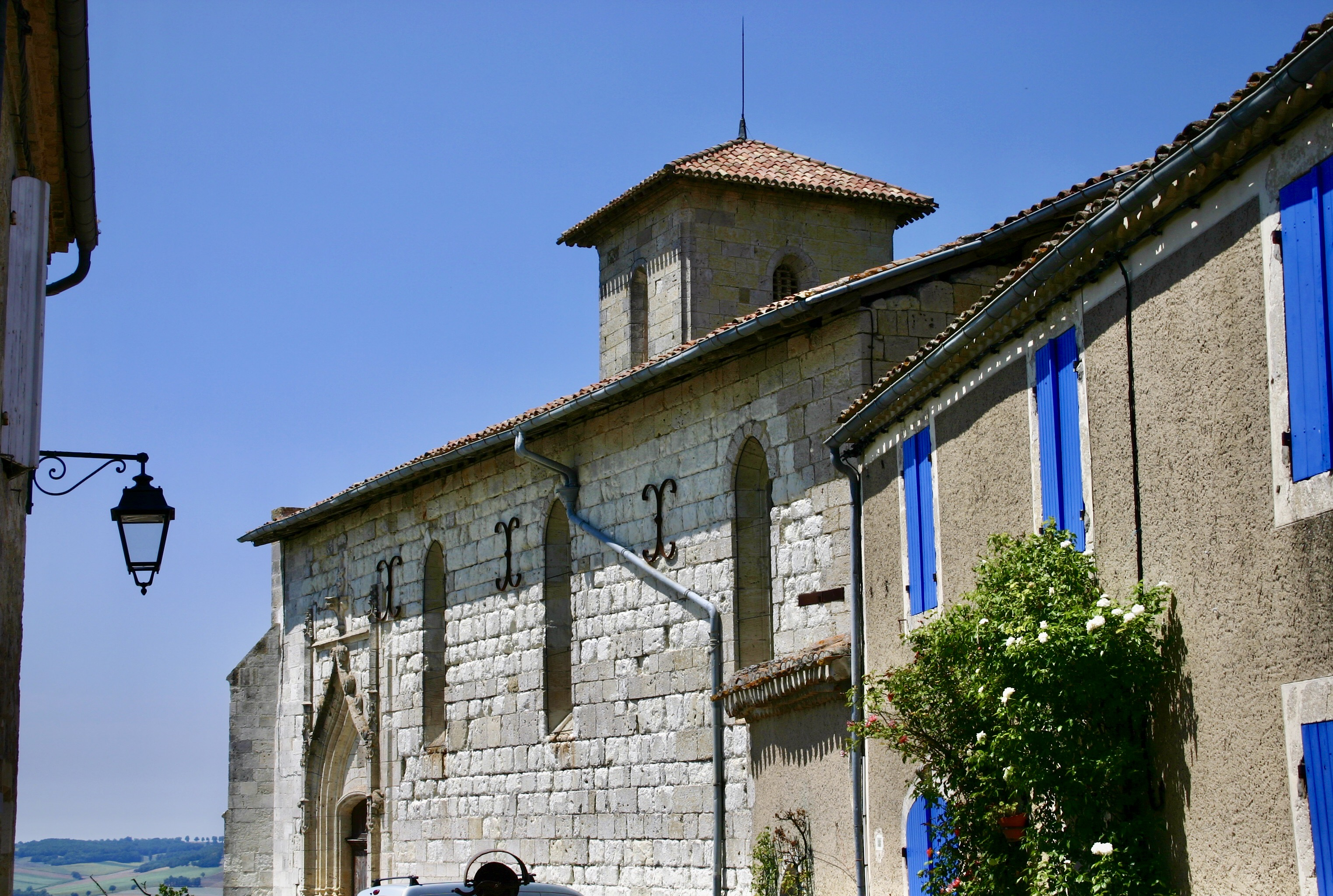 Vue sur l'église depuis la rue centrale de Castéra-Lectourois (département du Gers, France). Copyright (c) 2006 David Farreny. Permission vous est donnée de copier, distribuer et/ou modifier ce document selon les termes de la Licence GNU Free Documentation License, Version 1.2 ou ultérieure publiée par la Free Software Foundation ; sans sections inaltérables et sans pages de couverture. [1] Permission is granted to copy, distribute and/or modify this document under the terms of the GNU Free Documentation License, Version 1.2 or any later version published by the Free Software Foundation; with no Invariant Sections, no Front-Cover Texts, and no Back-Cover Texts. [2]